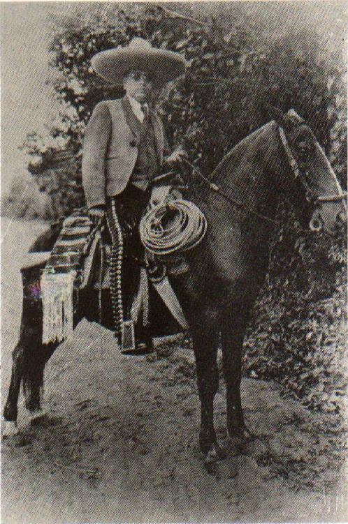 Coronel Daniel Andrade